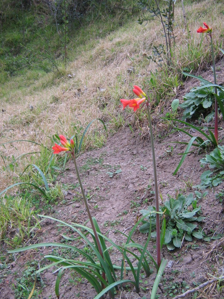 Eustephia coccinea Cav., añañuca